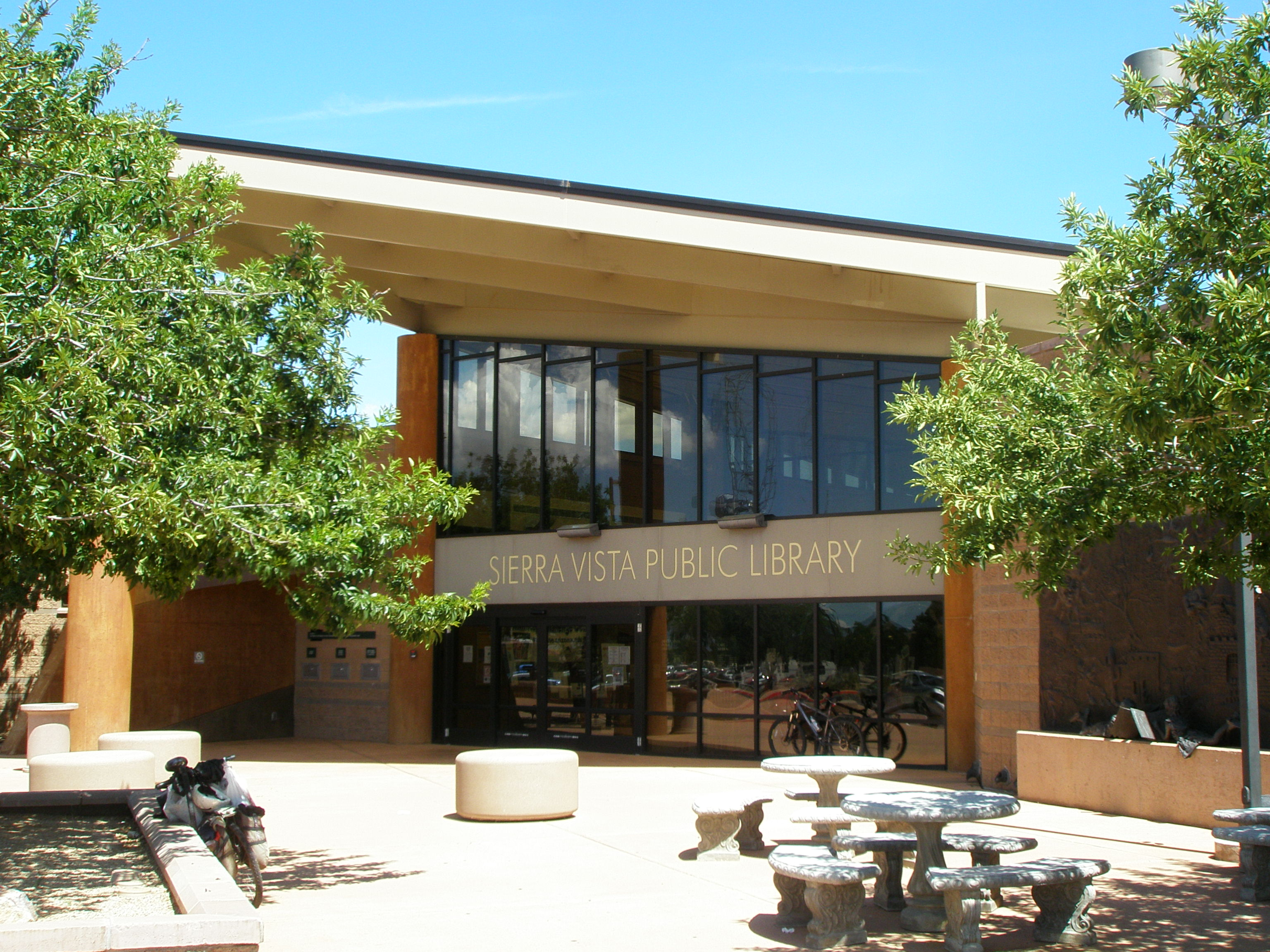 Sierra Vista, Arizona.